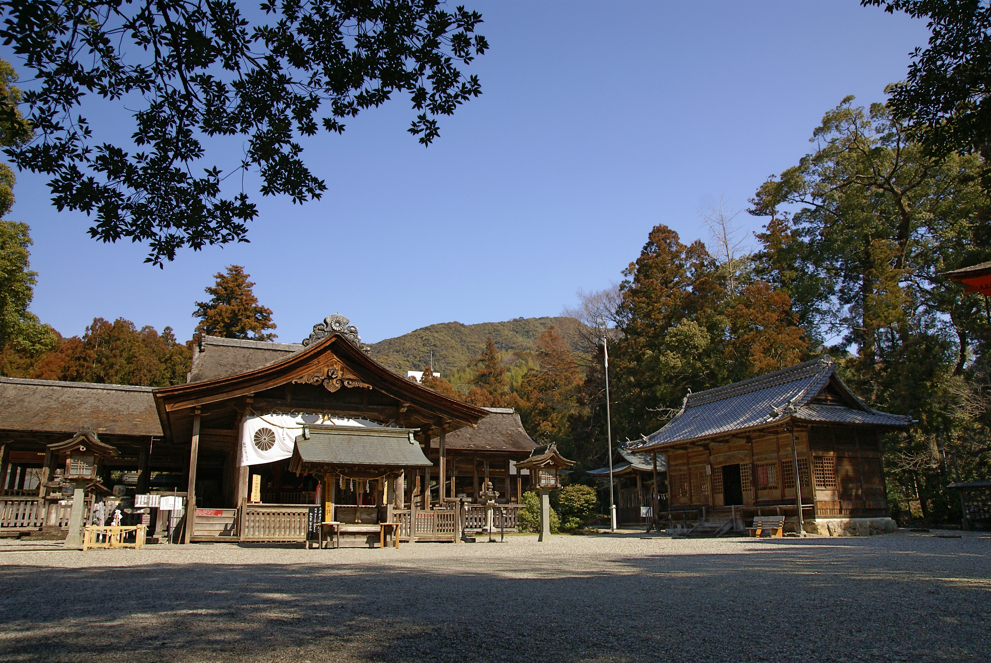 Tosa-jinja in Kochi, Kochi prefecture, Japan